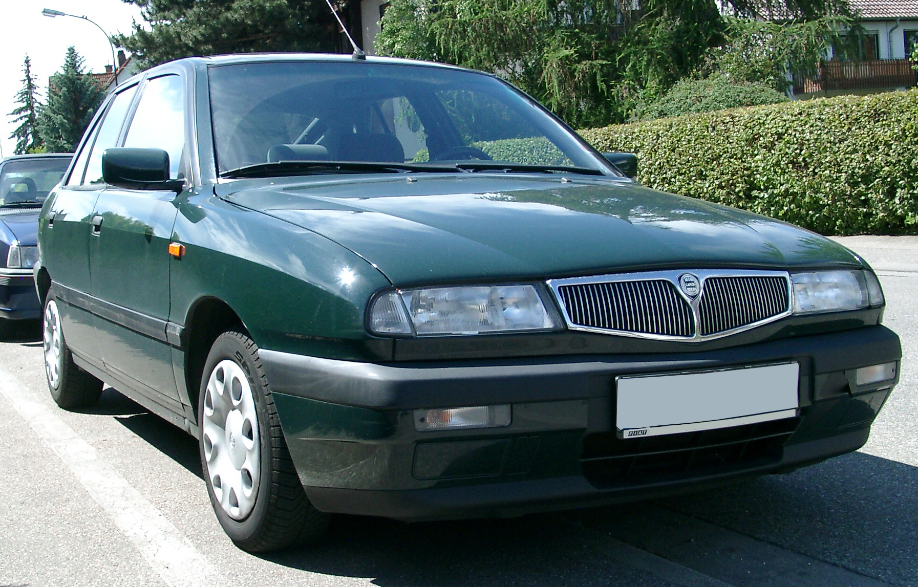 Lancia Delta, 2. Generation